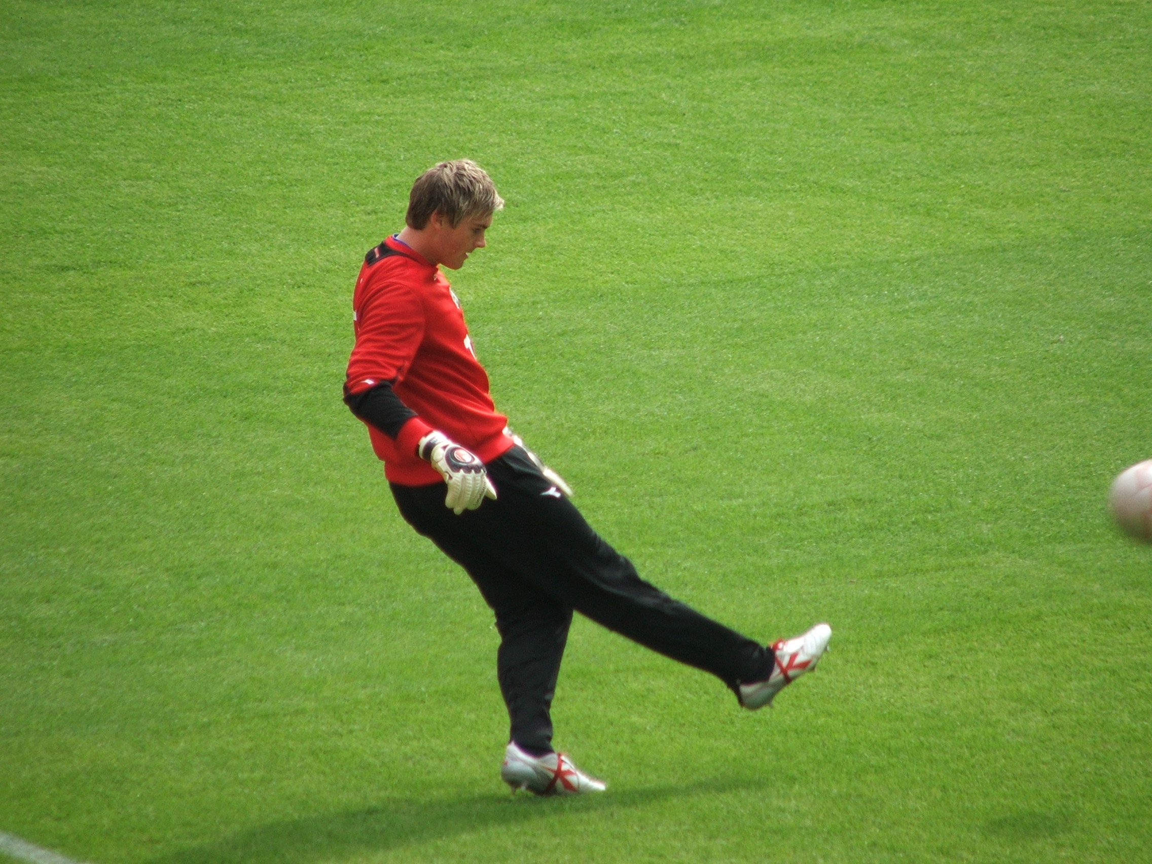 Morten Jensen während der Partie Hannover 96 - SV Werder Bremen